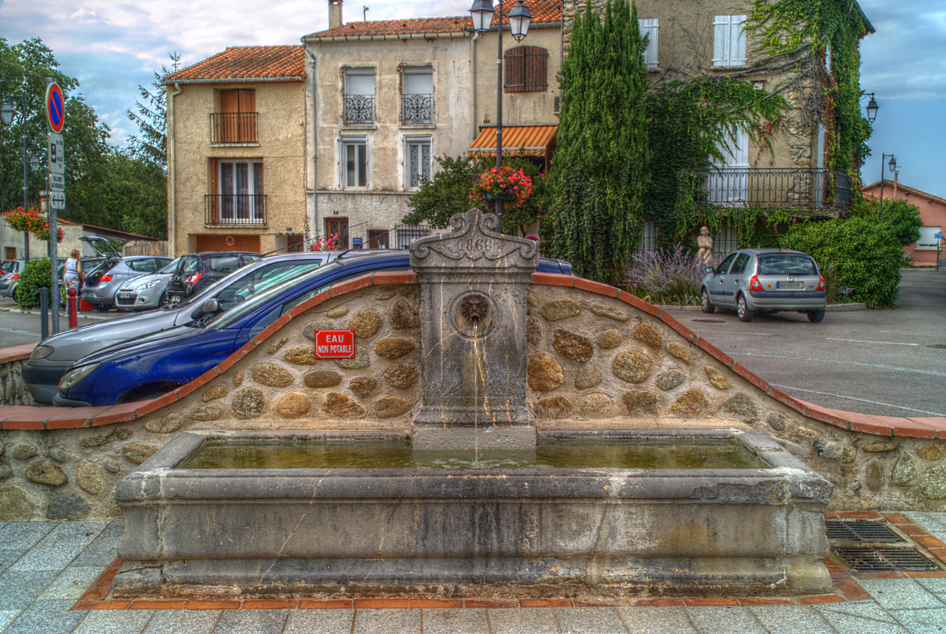 Fontaine de la placeta dels Traginers, Maureillas-las-Illas (Pyrénées-Orientales, Languedoc-Roussillon, France), La Jonquera (Haut-Ampurdan, Catalogne, Espagne)